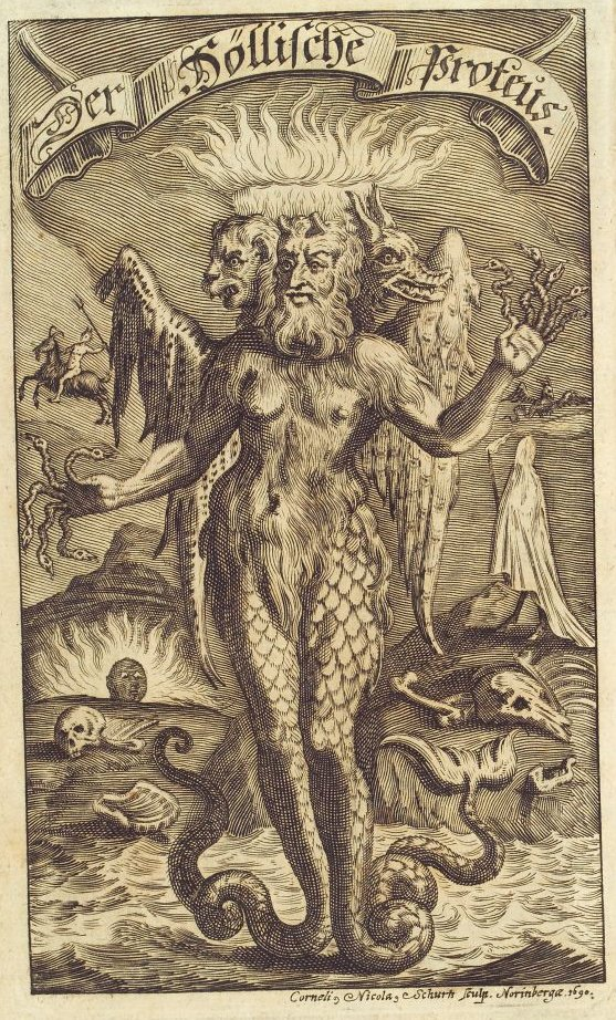 34. Der höllische Proteus (aus Der Höllische Proteus, oder Tausendkünstige Versteller, vermittelst Erzehlung der vielfältigen Bild-Verwechslungen Erscheinender Gespenster, Werffender und poltrender Geister, gespenstischer Vorzeichen der Todes-Fälle, Wie auch Andrer abentheurlicher Händel, arglistiger Possen, und seltsamer Aufzüge dieses verdammten Schauspielers, und, Von theils Gelehrten, für den menschlichen Lebens-Geist irrig-angesehenen Betriegers), S. 409.